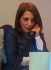 Bilkay Öney als Abg. im Landtag Berlin